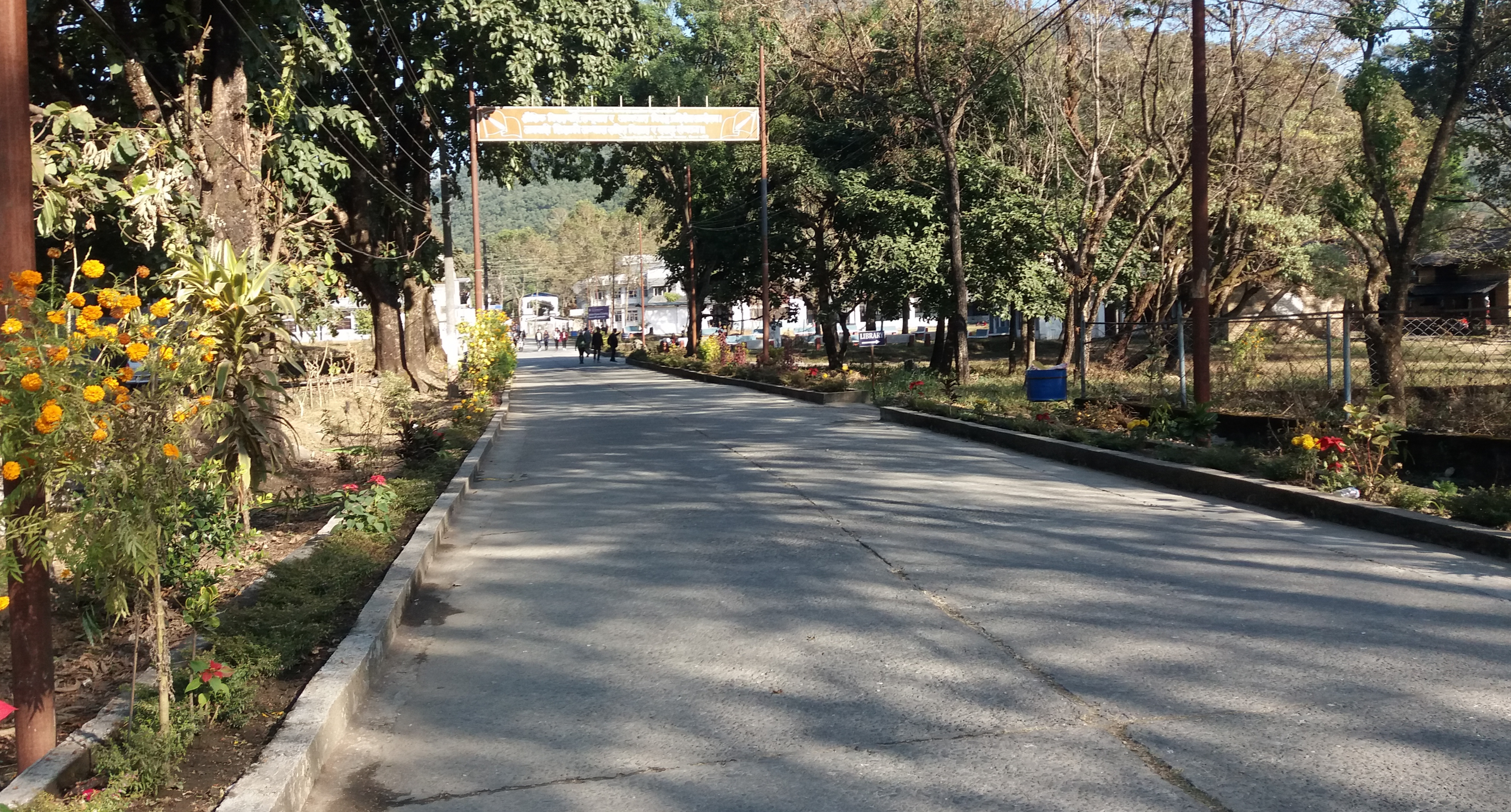 नेपाली: पृथ्वीनारायण क्याम्पसको प्रवेशमार्ग